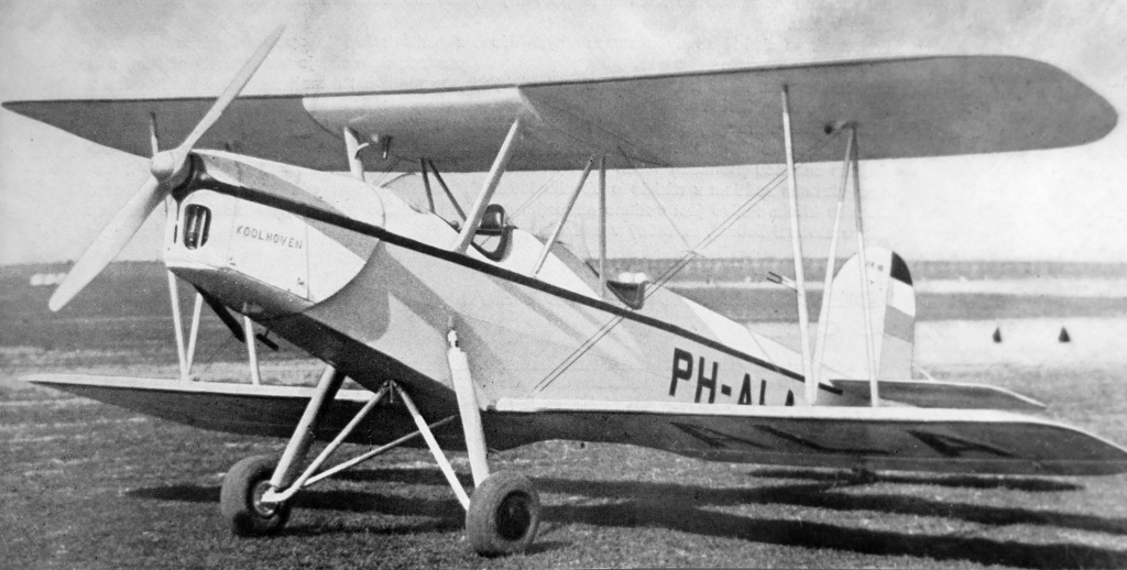 letecký motor Walter Minor 4 a letoun Koolhoven F.K.46L (1936)